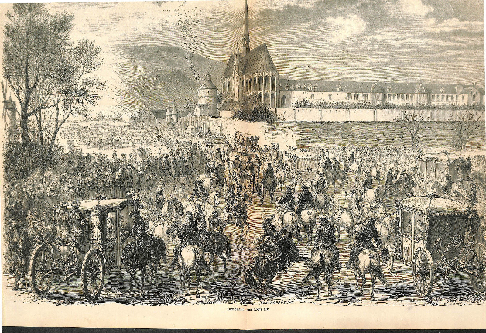 L'abbaye de Longchamp sous le règne de Louis XIV, gravure de 1859. À l'arrière-plan, le mont Valérien.